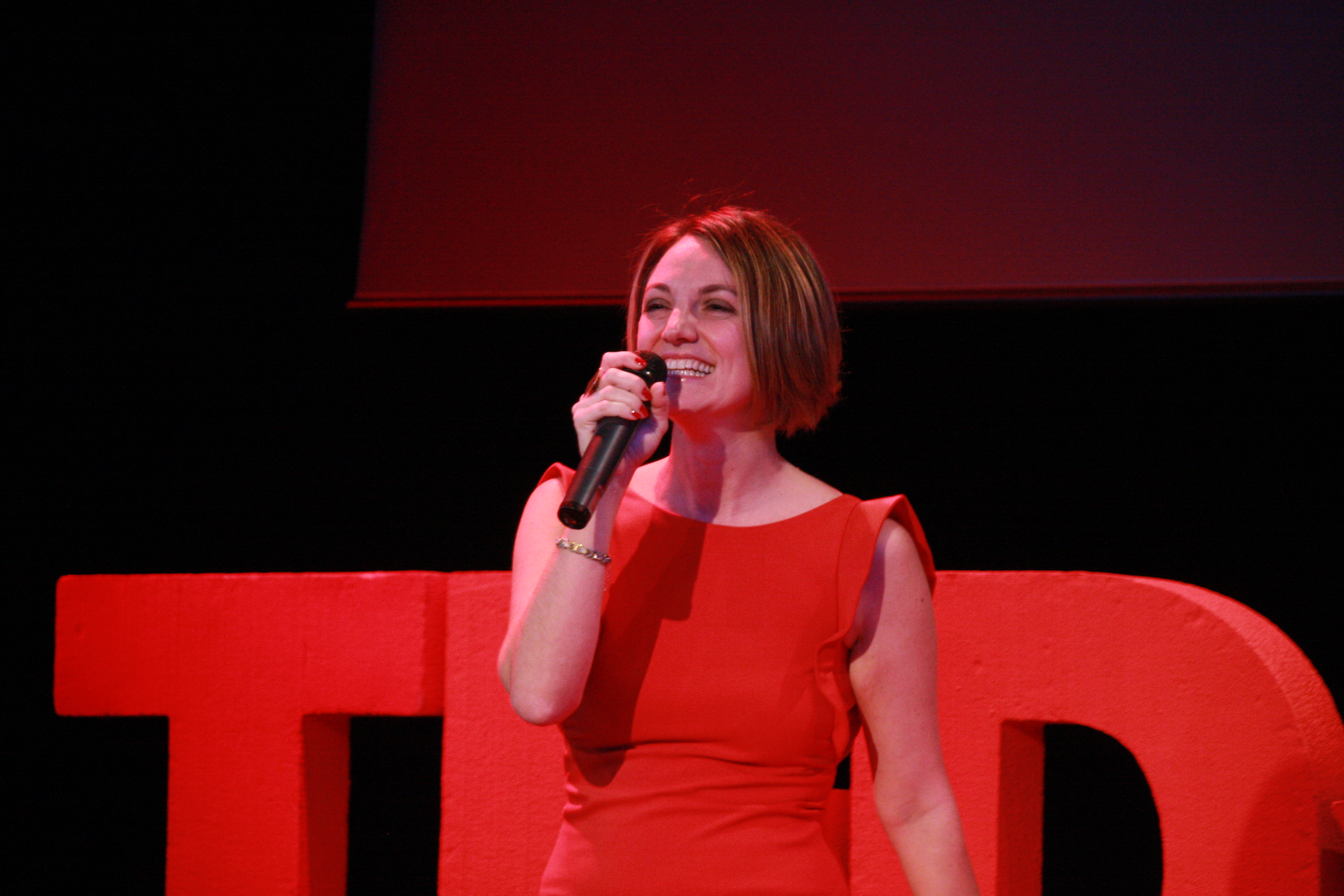 Aurélie Salvaire en una sessió de TEDx Barcelona Women